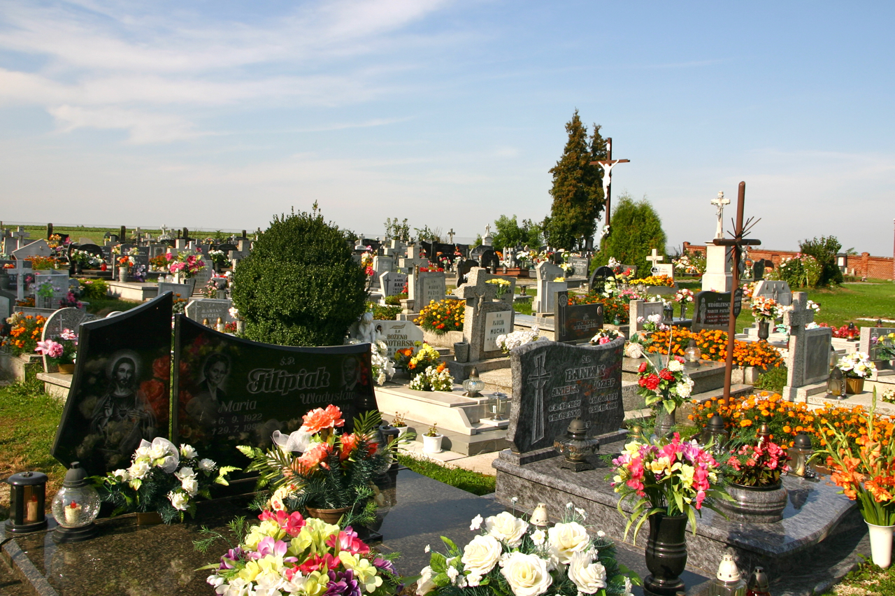 Kolnowice (dodatkowa nazwa w j. niem. Kohlsdorf) - wieś w Polsce położona w województwie opolskim, w powiecie prudnickim, w gminie Biała.